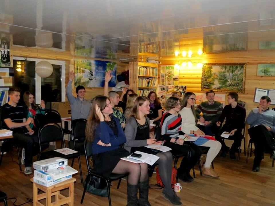 Template:Файл